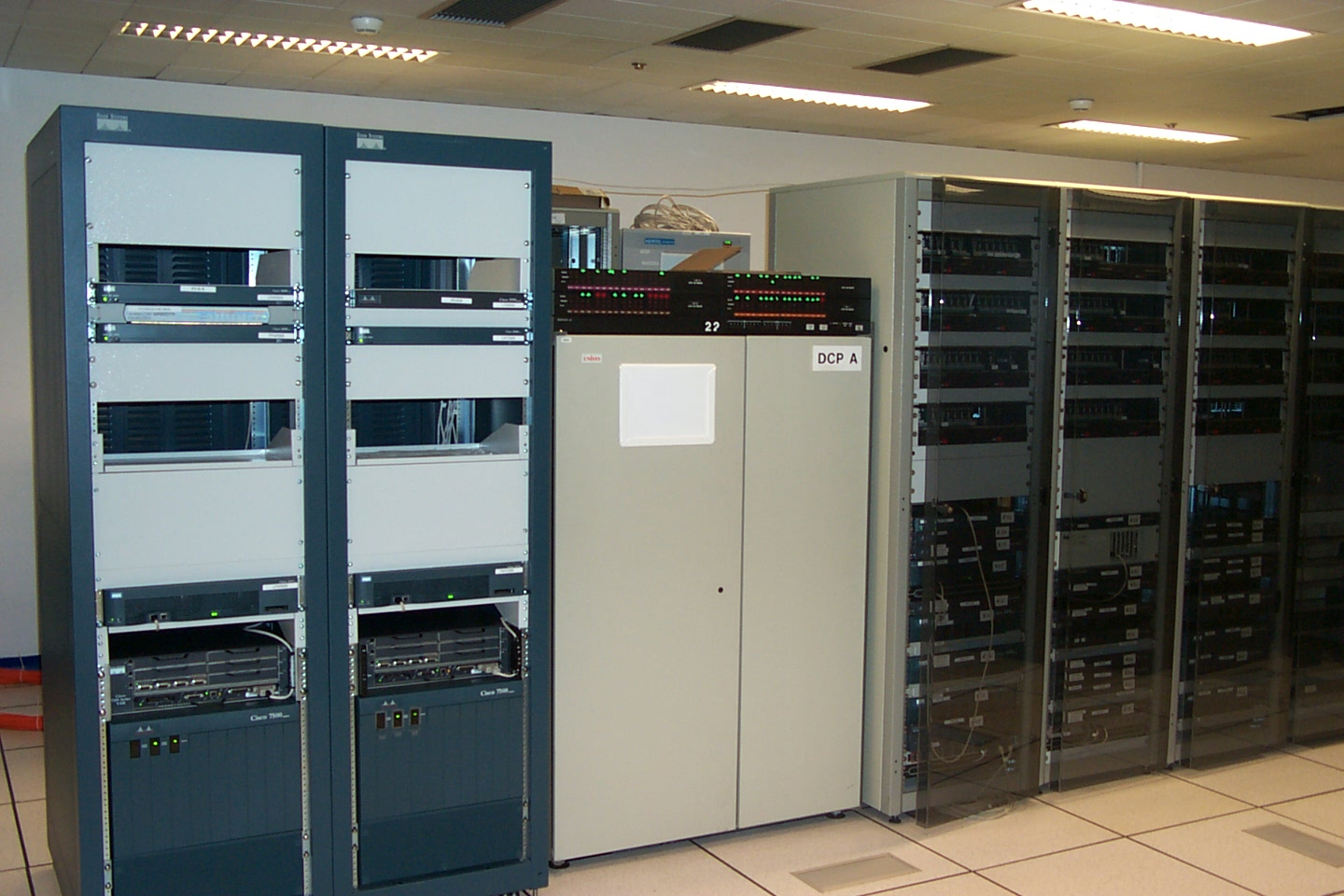 Vue de baies télécom du laboratoire client "Lab-SENIC" ("SITA Equant Network Integration Center") à Neuilly-sur-Seine, commun à SITA et à Equant en janvier 2001 - Baies contenant des routers Cisco et un noeud de commutation Unisys DCP 40